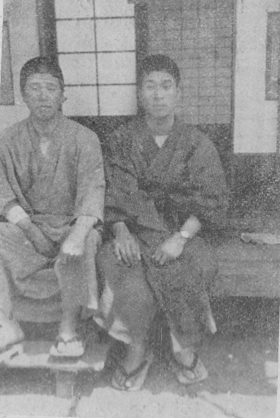 西住と大隈。